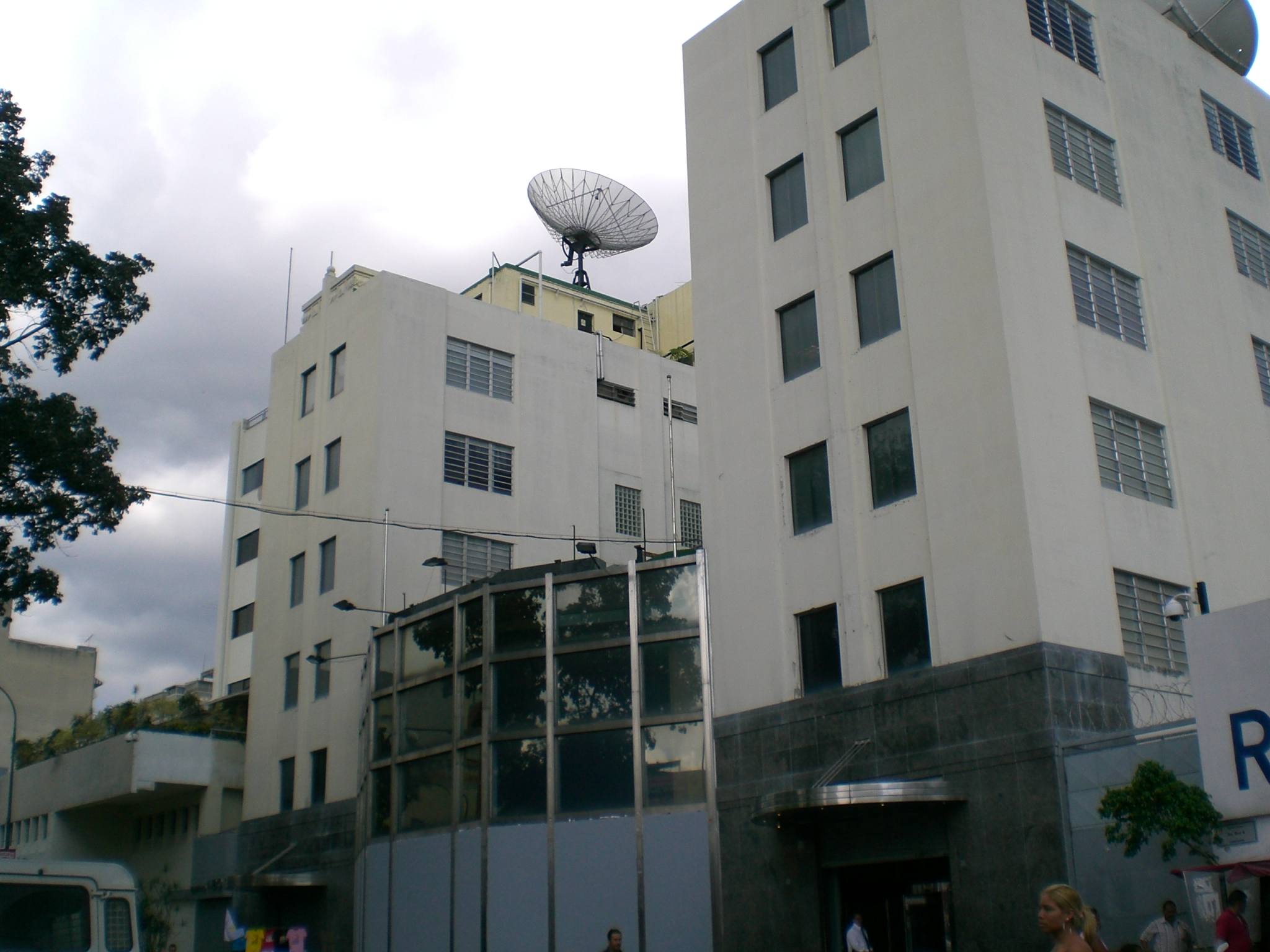 RCTV building, Caracas, Venezuela